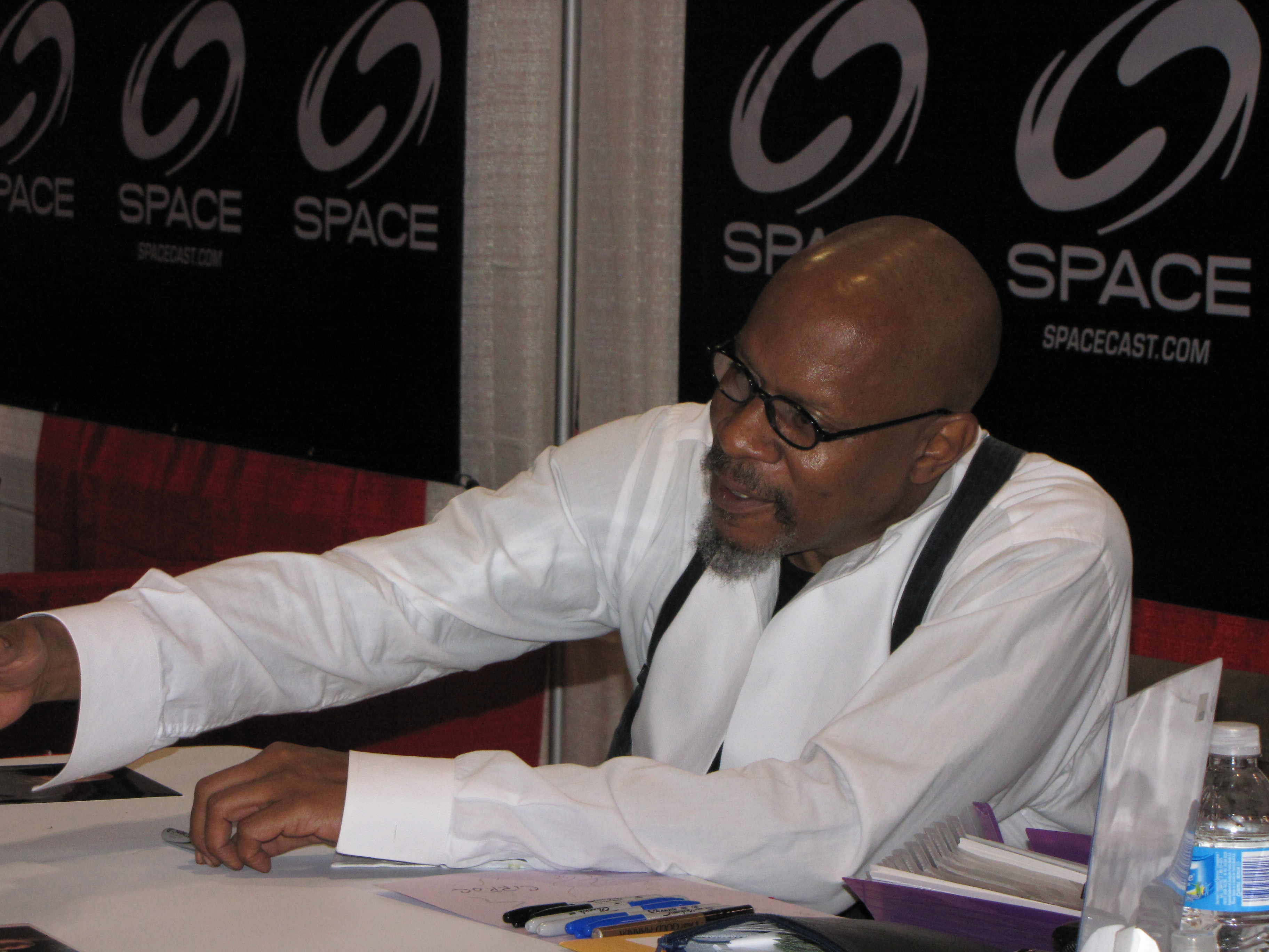 Captain Benjamin Sisko, Avery Brooks.